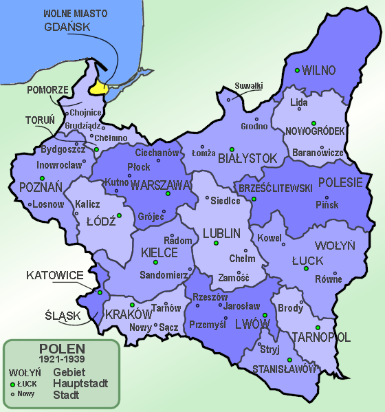 Karte von Polen / Map of Poland